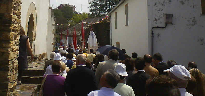 Momento da procesión das Cruces polo latral sur do santuario